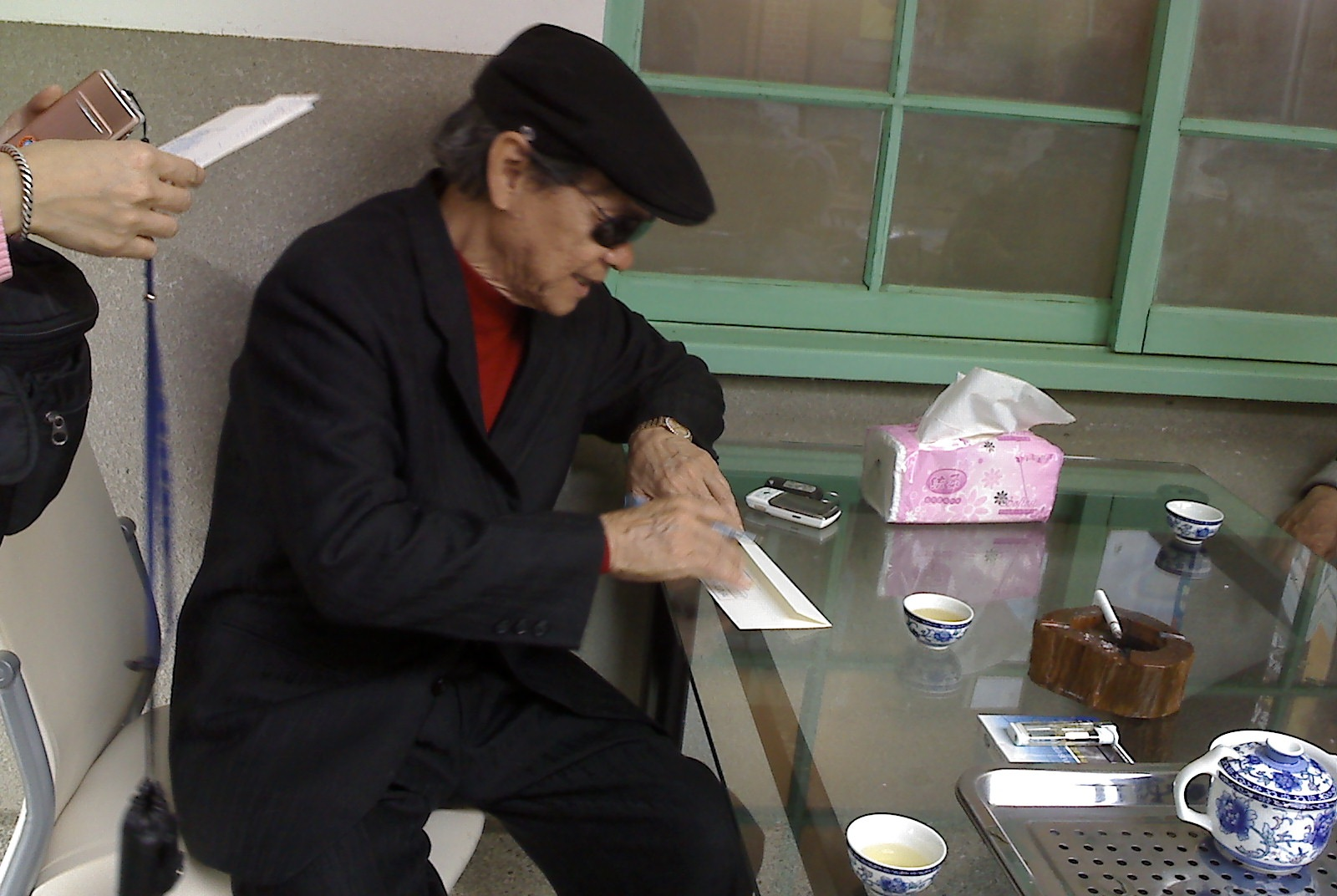 虎尾偶戲館遇見黃俊雄